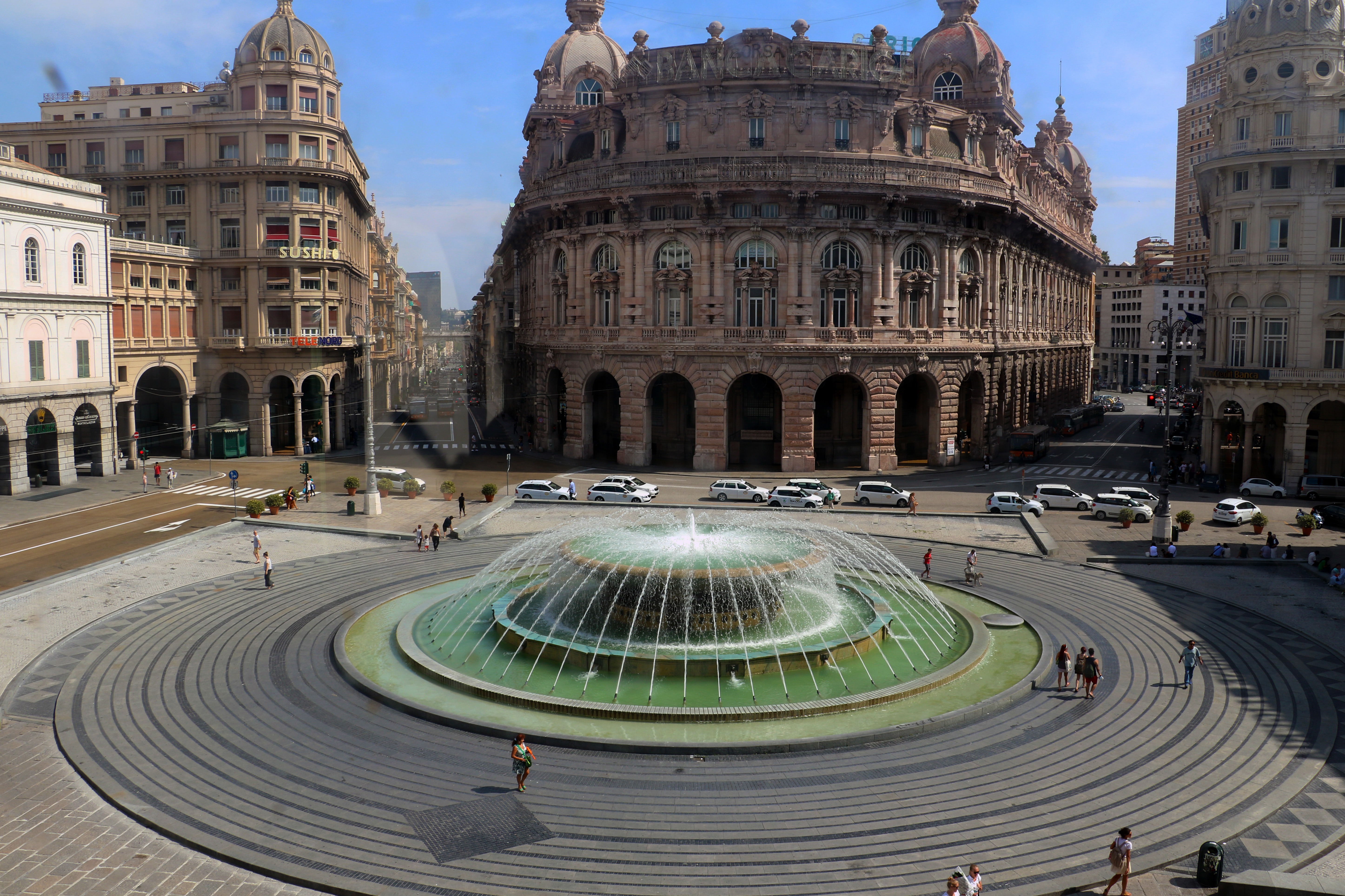 Fontana di Piazza De Ferrari-- scatto effettuato dall'interno di Palazzo Ducale This is a photo of a monument which is part of cultural heritage of Italy.